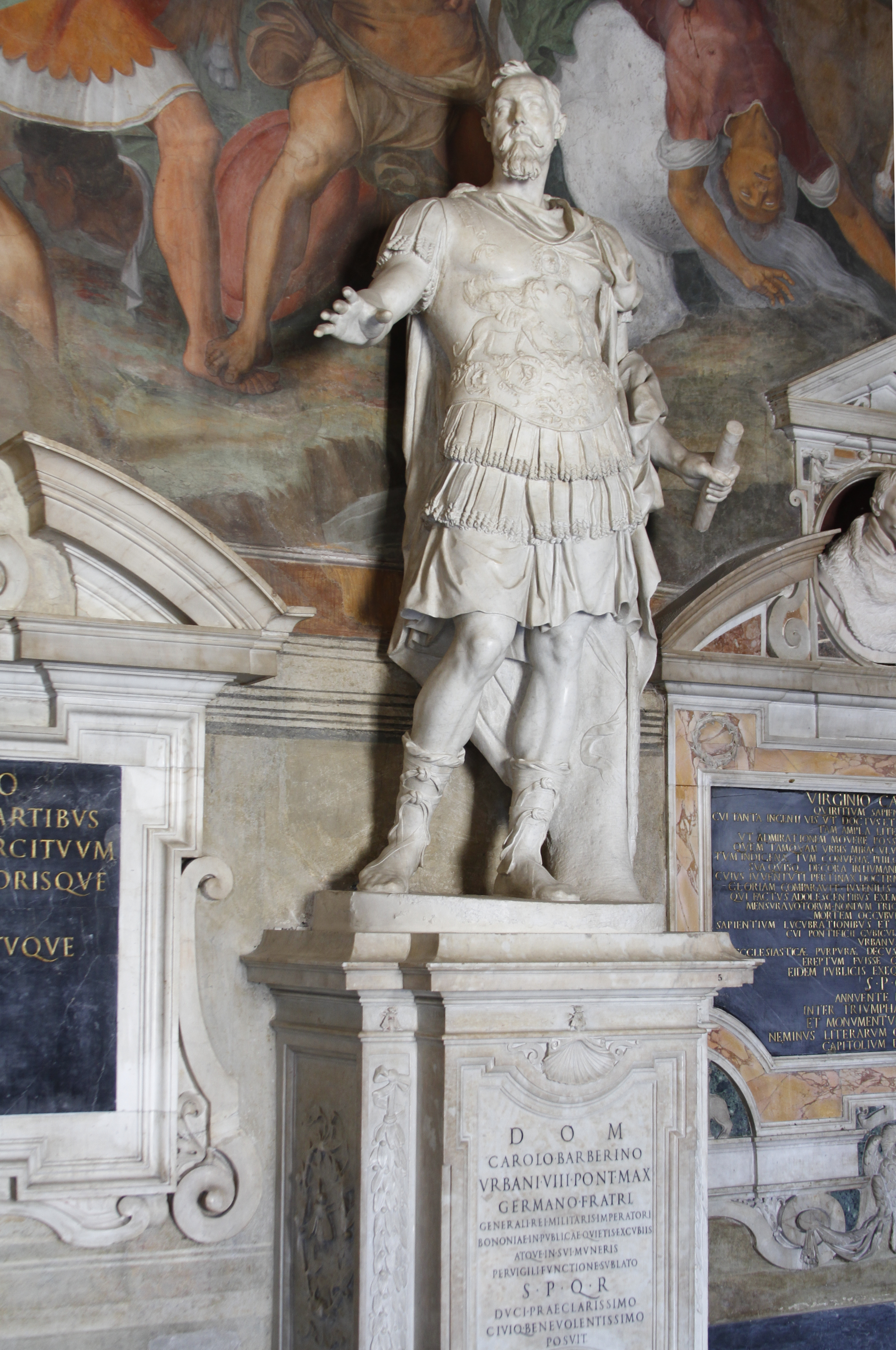 Palazzo dei Conservatori - Musei Capitolini - Rome